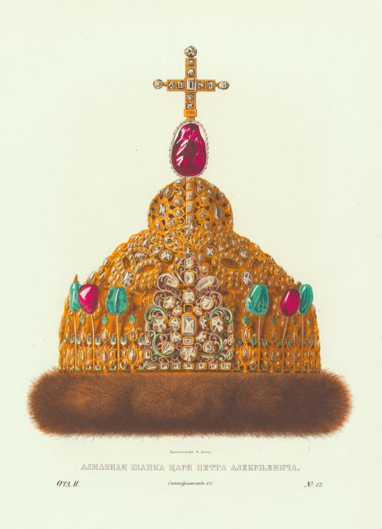 Алмазный венец для царя Петра Алексеевича